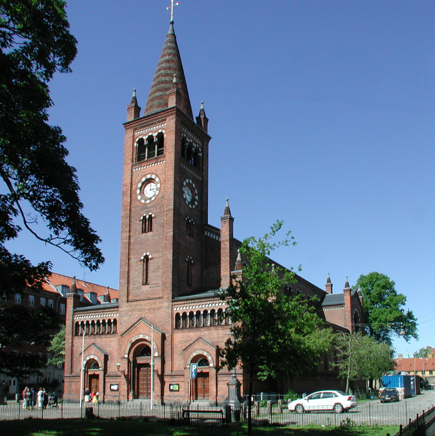 Sankt Pauls Kirke, Copenhagen, Denmark.